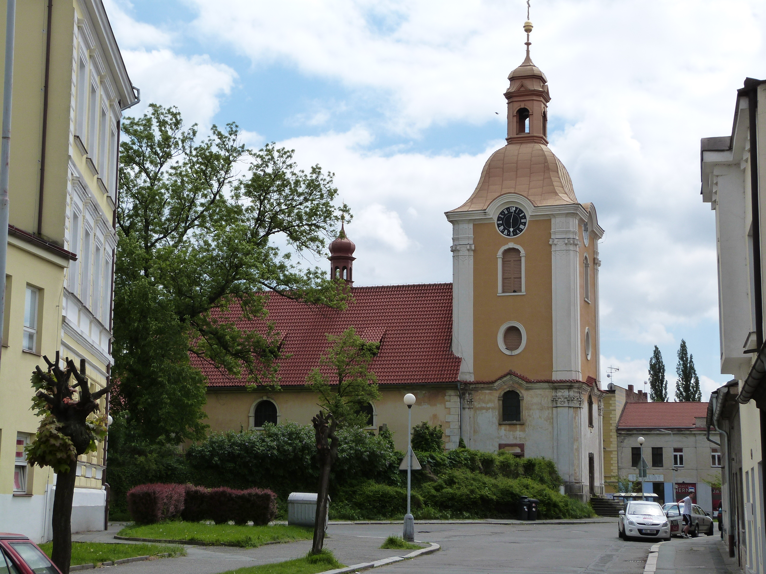 Kostel sv. Víta v Kolíně